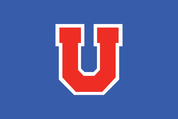 Bandera del Club Universidad de Chile.